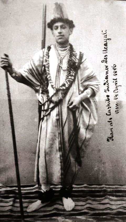 Karl von Urach in der Kleidung der peruanischen Cashibo-Indianer bei einer seiner Reisen 1886.